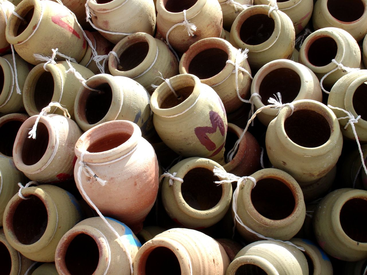 Port de Houmt Souk, Djerba